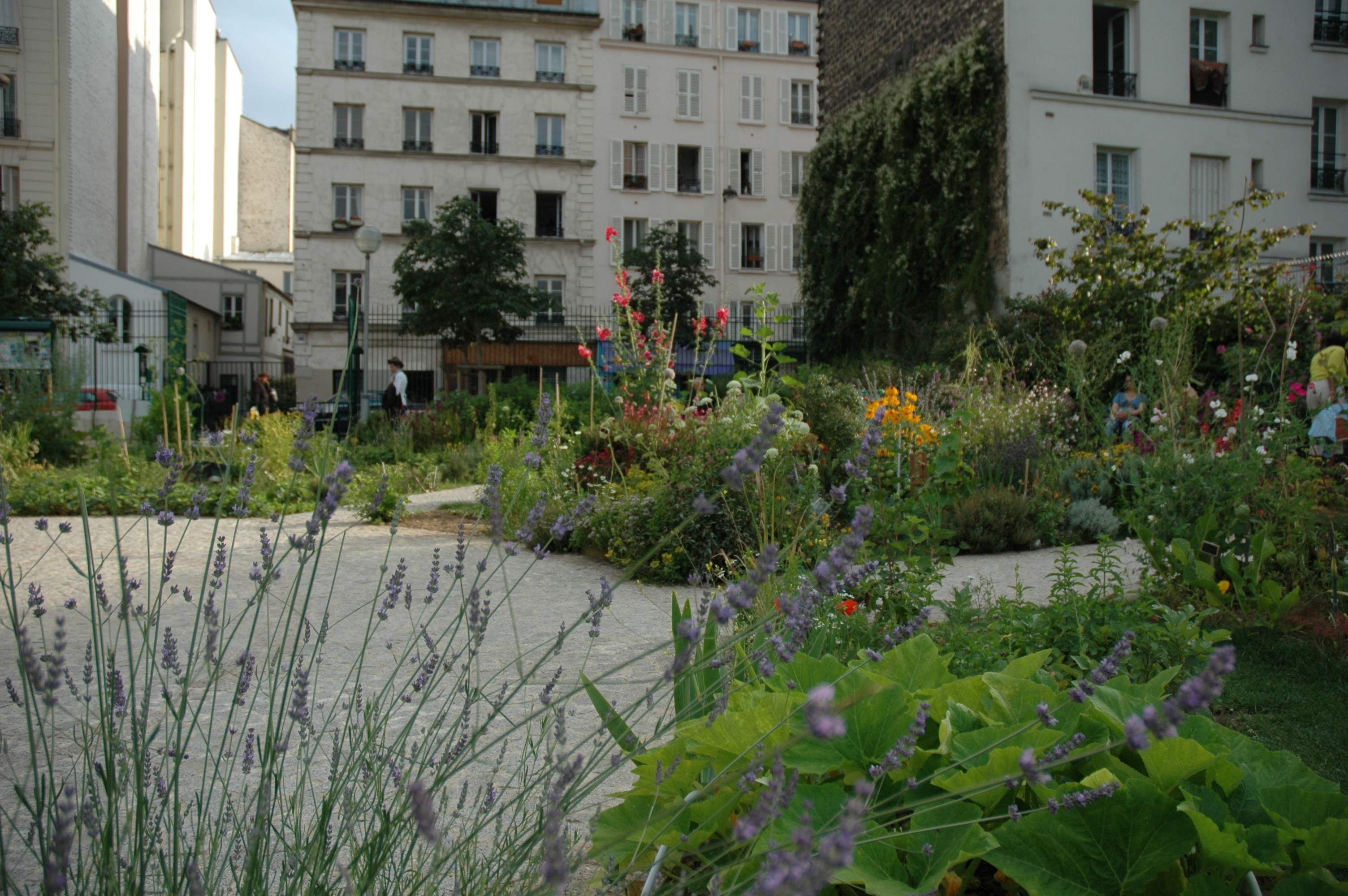 Jardin Partagé du Poireau Agile, Paris.